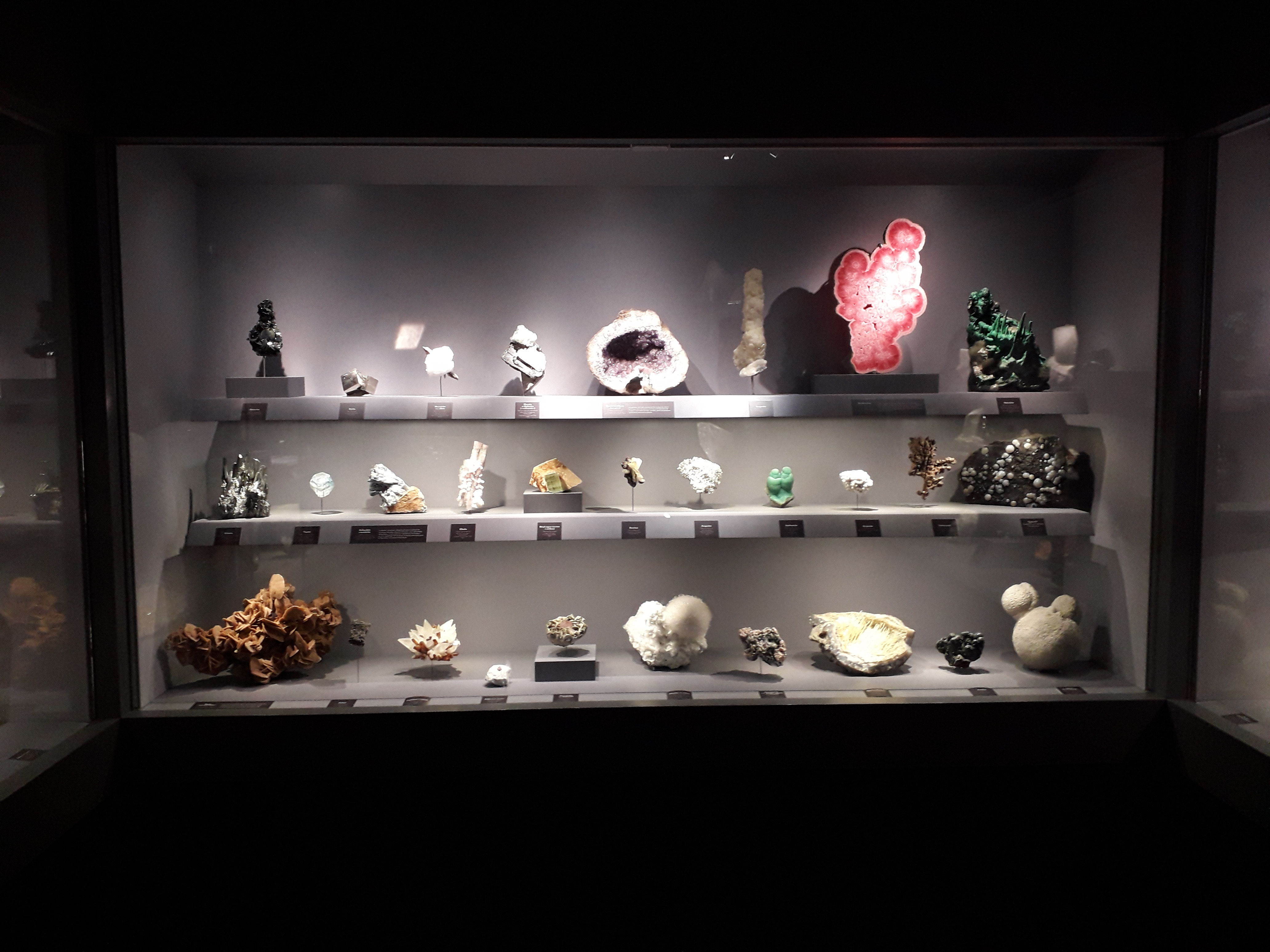 Vitrine de cristaux de l'exposition permantente « Trésors de la terre » (ici photographiée en octobre 2017) dans la galerie de Minéralogie et de Géologie (Muséum national d'histoire naturelle), au Jardin des plantes, à Paris, en France.